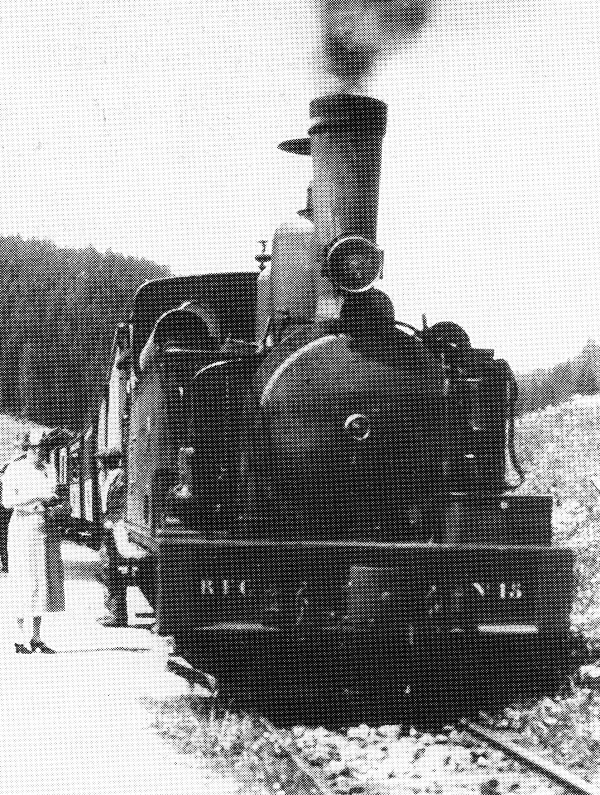 Locomotive Corpet - Louvet 030 n°15 du RFC (chemins de fer Régionaux de Franche-Comté) au départ de Maïche.